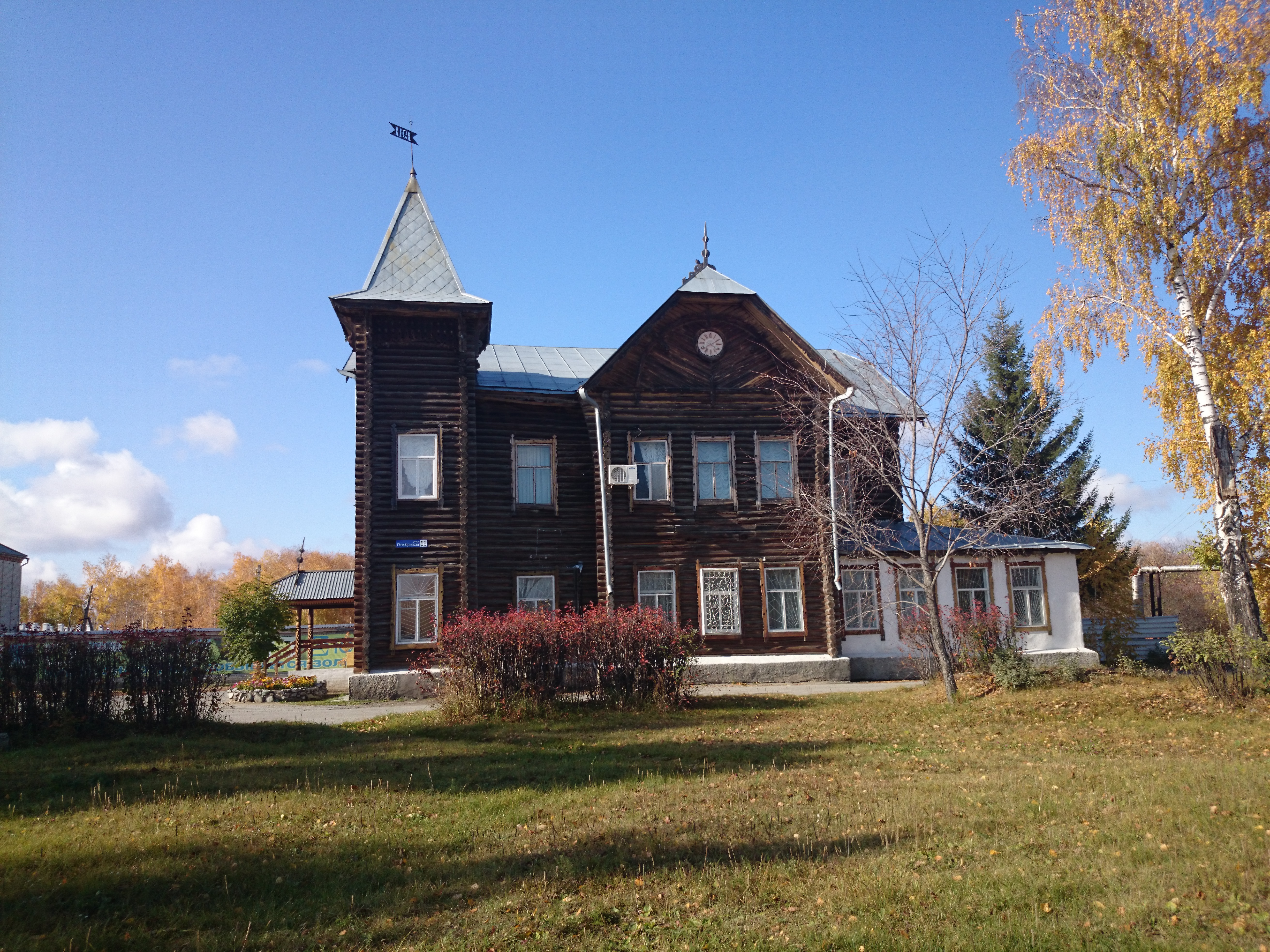 Дом, где останавливался советский ученый-маркшейдер Соболевский П. К. (Челябинская область, Пласт, Октяборьская улица, 36а)